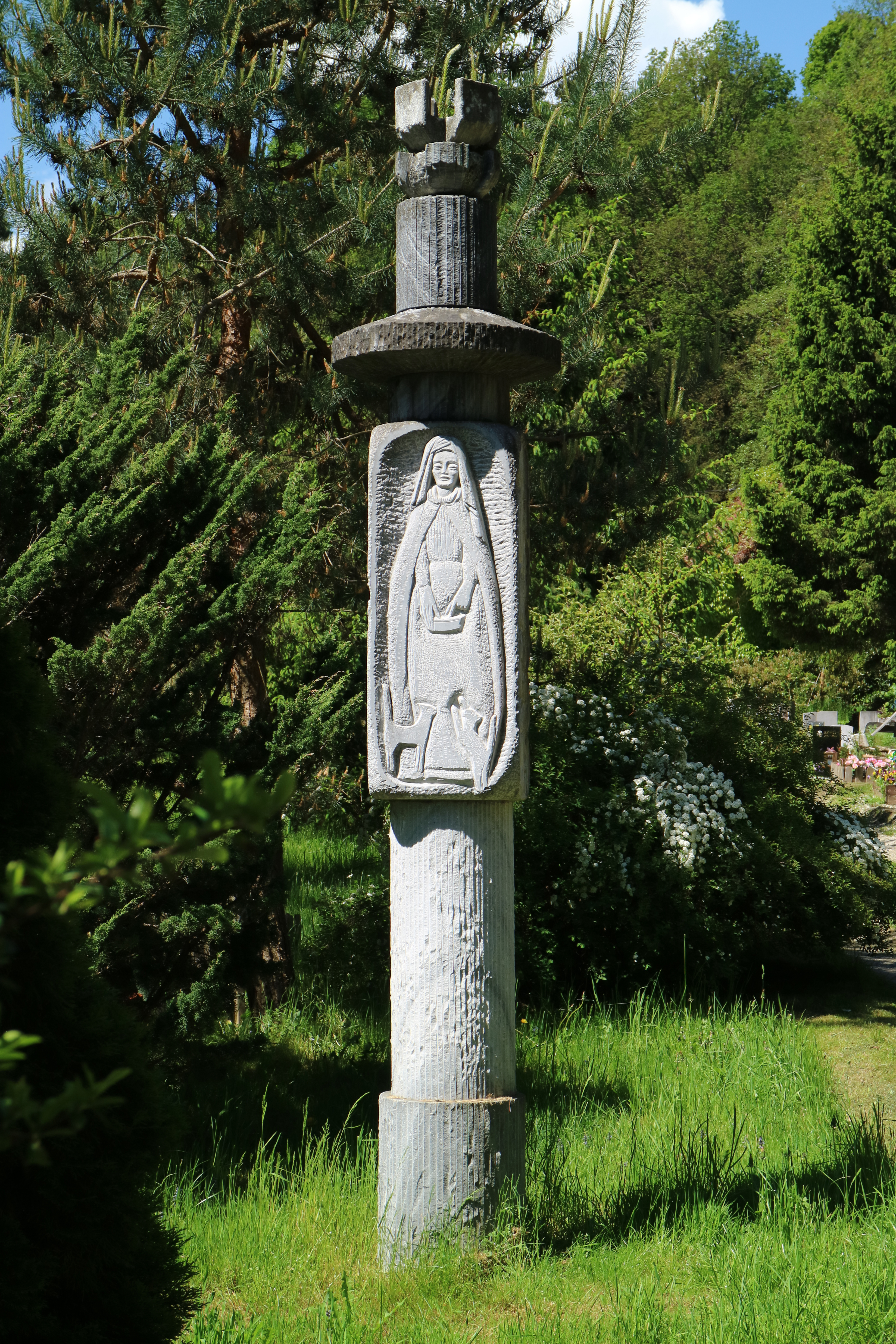 Bildsäule von Alfred Schlosser (1991) am Tierfriedhof Pirka